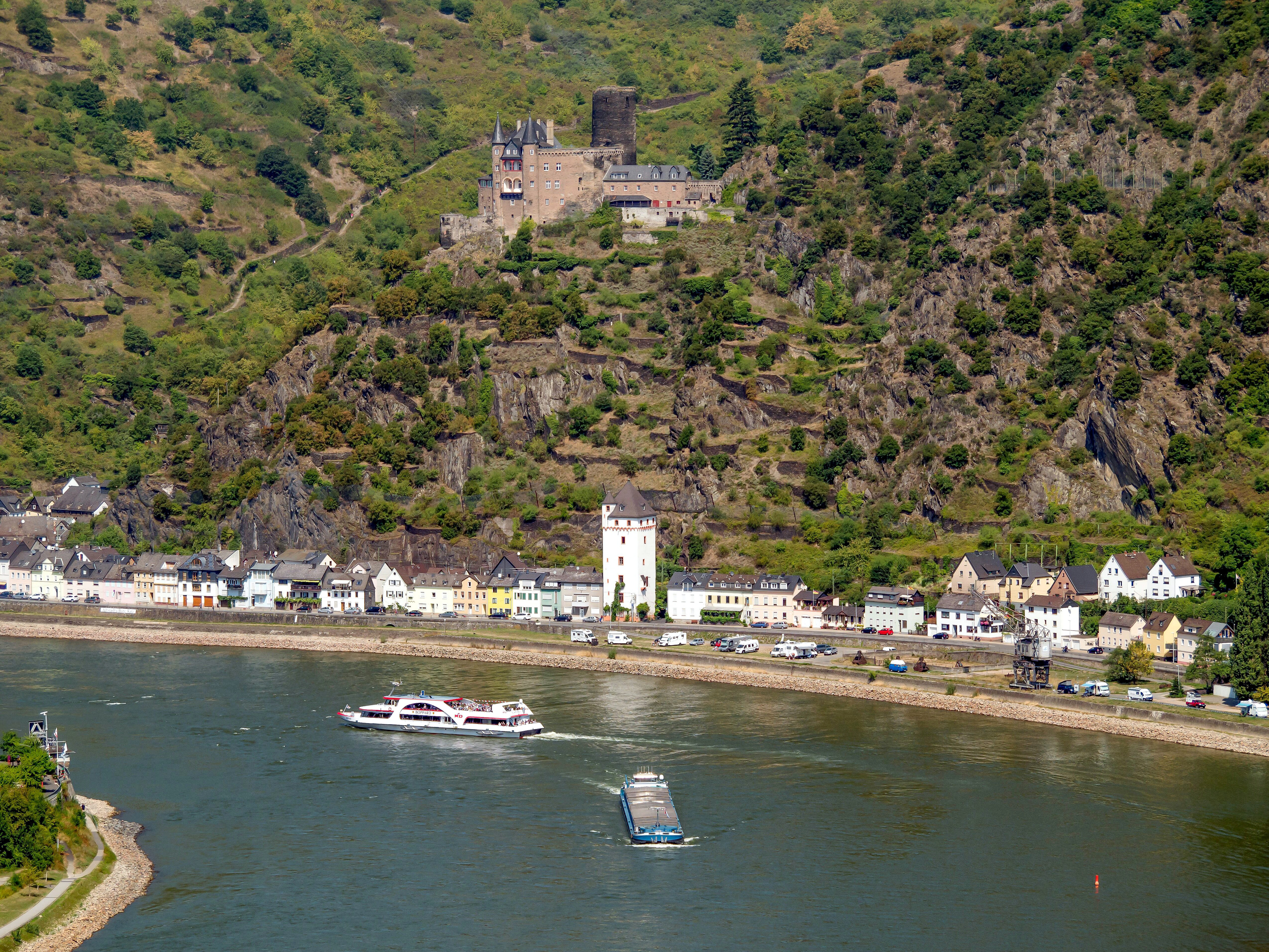 Blick vom Aussichtspunkt Maria Ruh auf den Rhein und Sankt Goarshausen